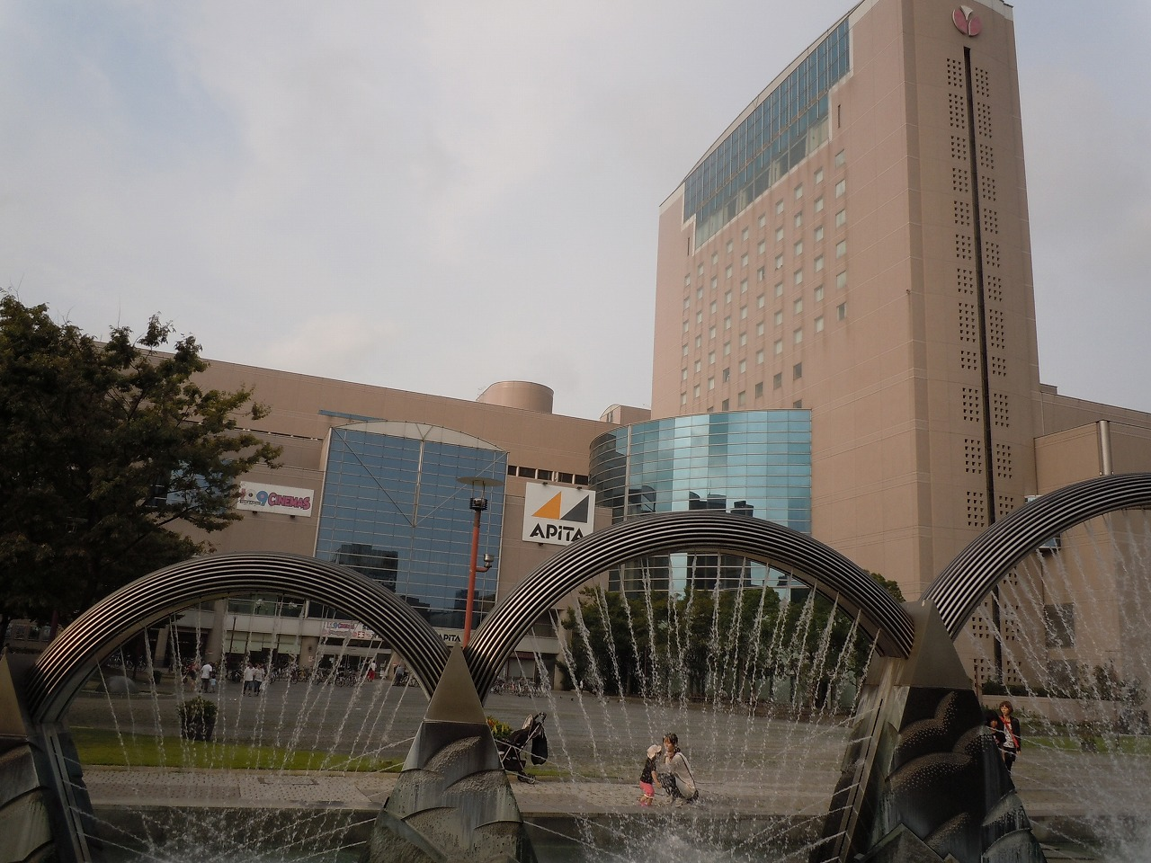 ララスクエア四日市近鉄四日市駅前の大型商業施設で、四日市都ホテルは三重県有数の高級ホテルです